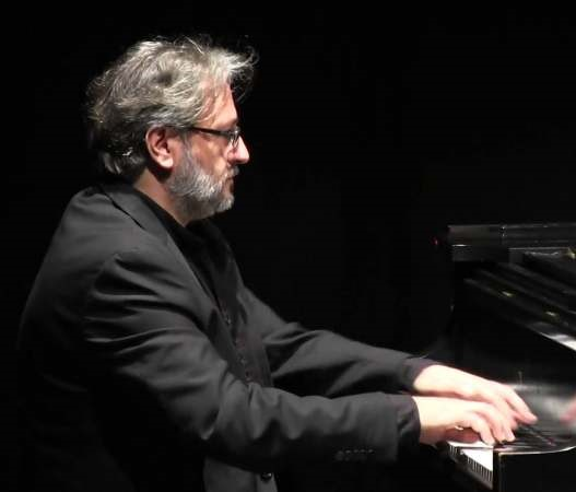 Rubén Lorenzo al piano en directo en ERART XII Festival de Música Contemporánea de Lima ICPNA